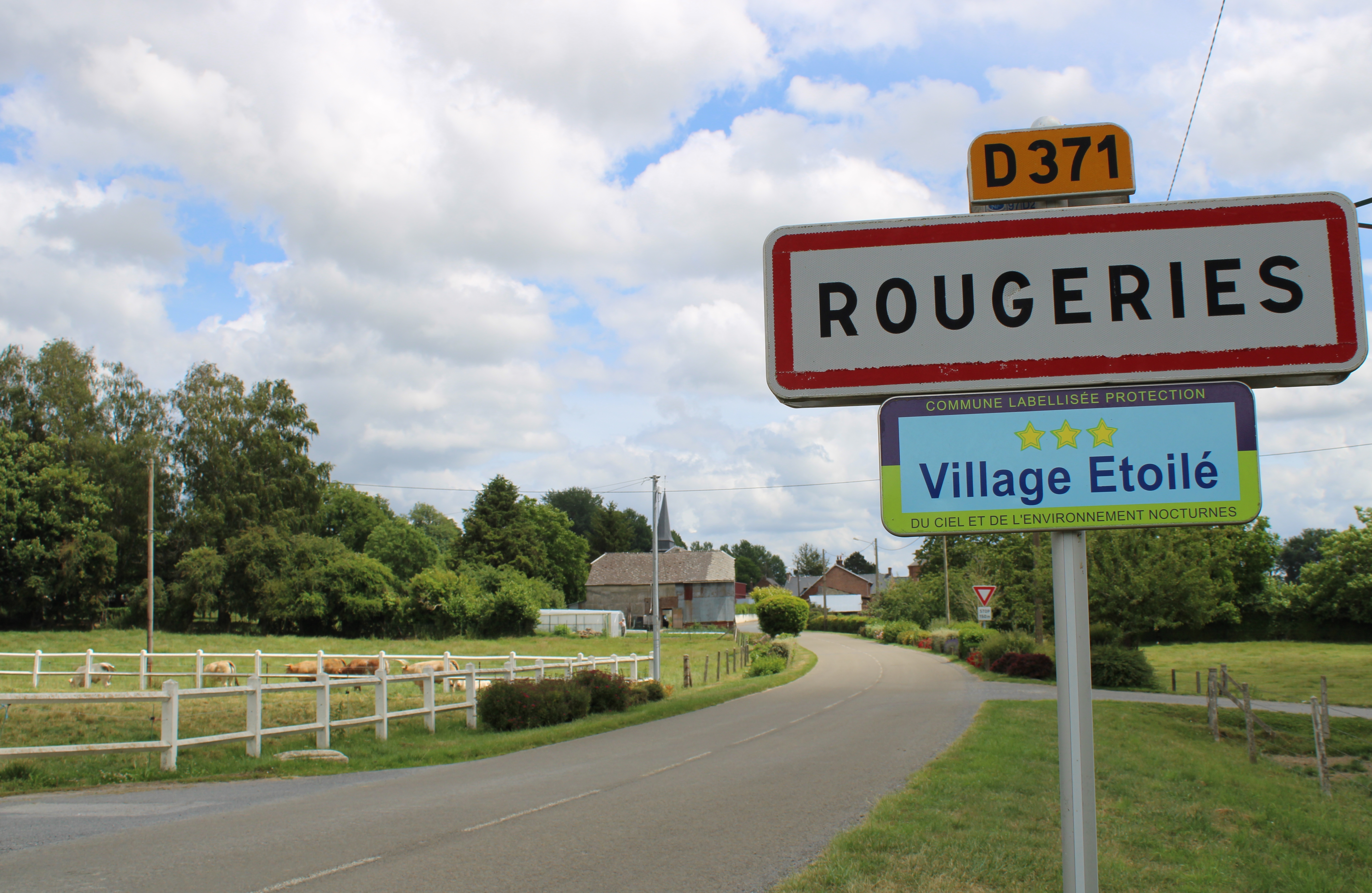 Entrée du village